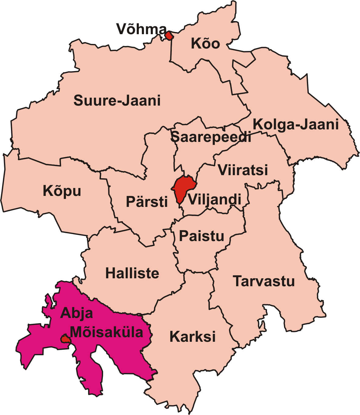 Abja valla kaart.